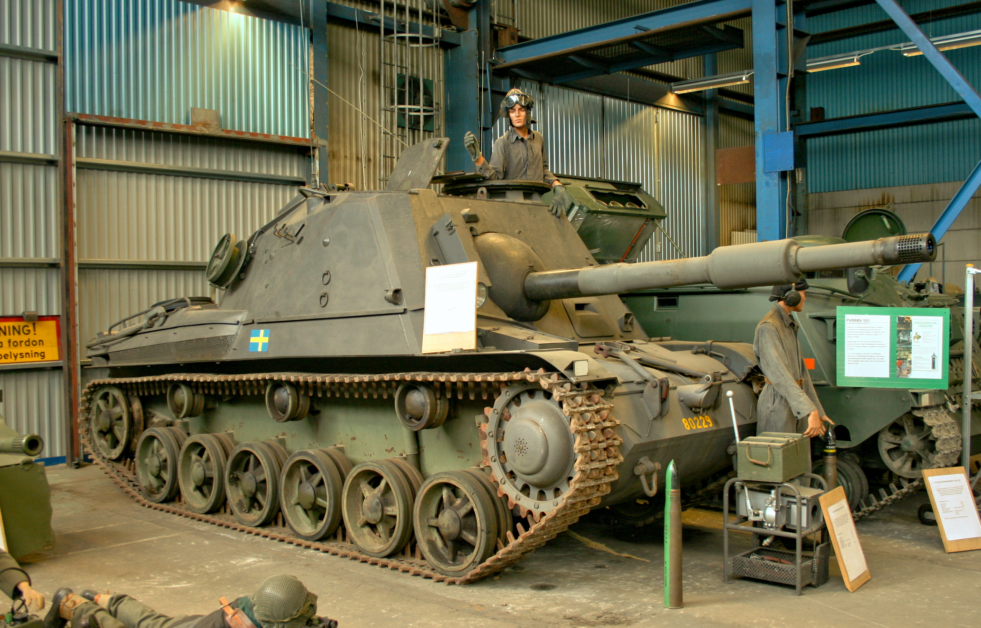 Pansarvärnskanonvagn m/43 i Hässleholms Museum 03.08.2008